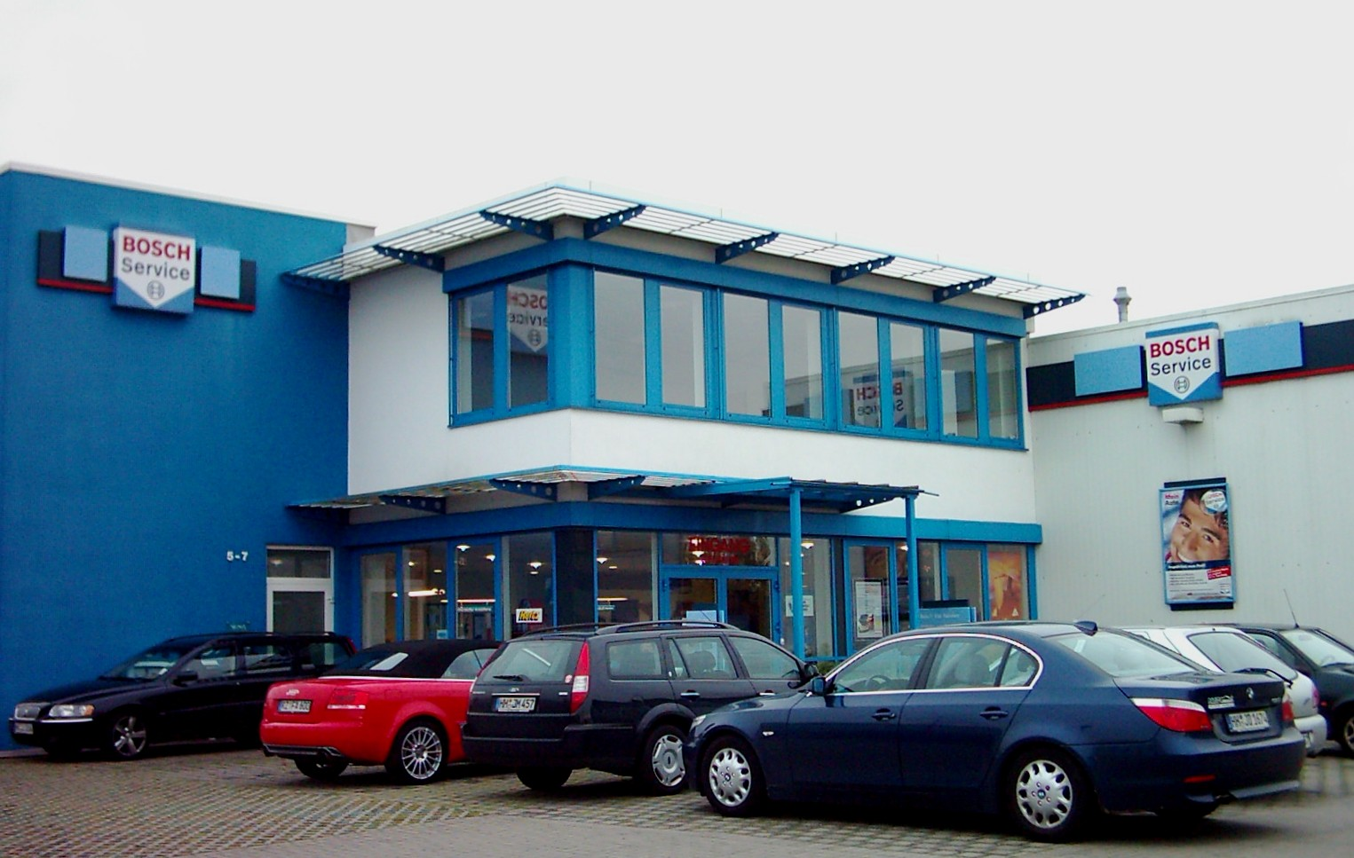 Bosch-Service in Hamburg-Rahlstedt, Gewerbegebiet Höltigbaum.